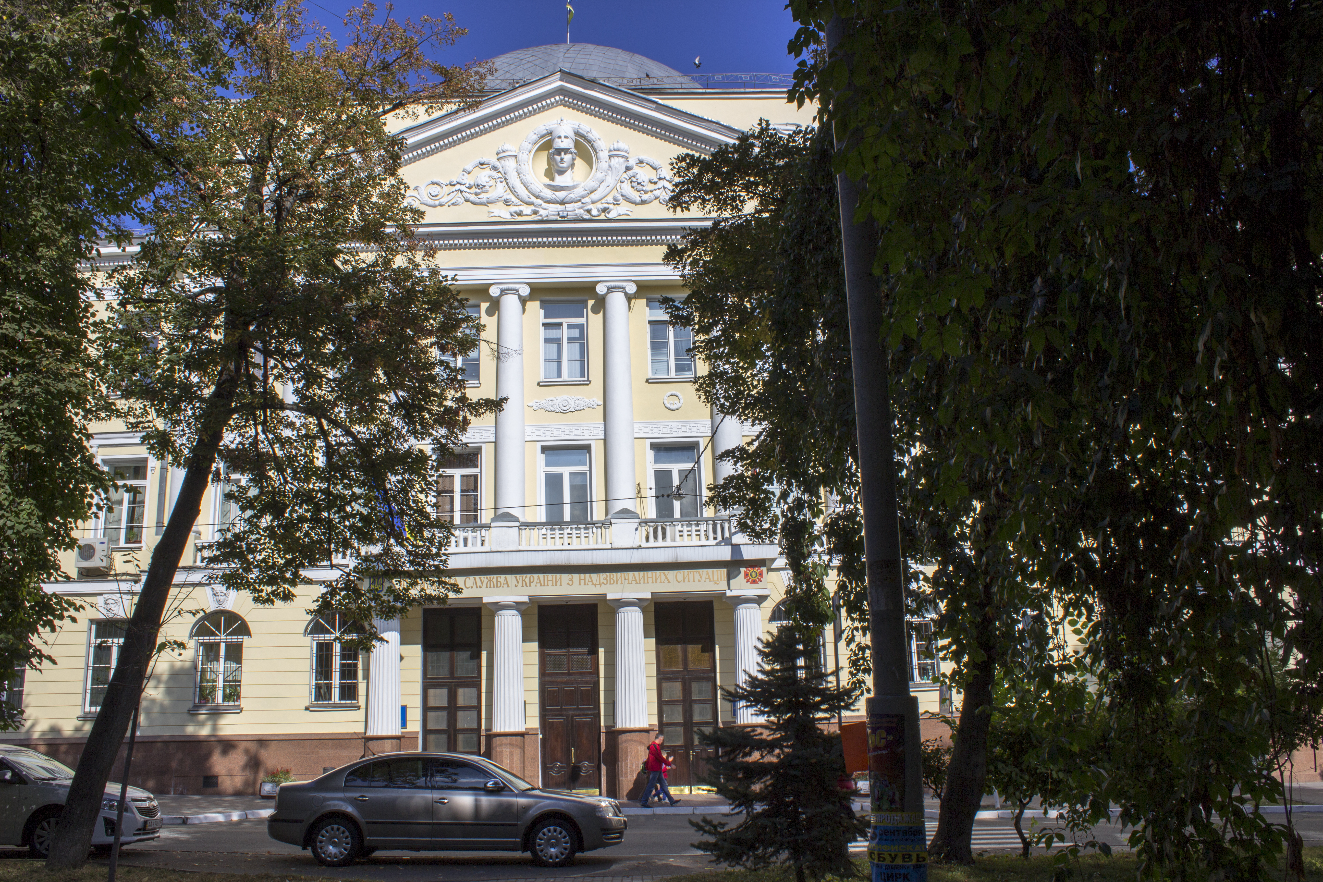 Курси вищі жіночі, Київ, вул. Олеся Гончара, 55а